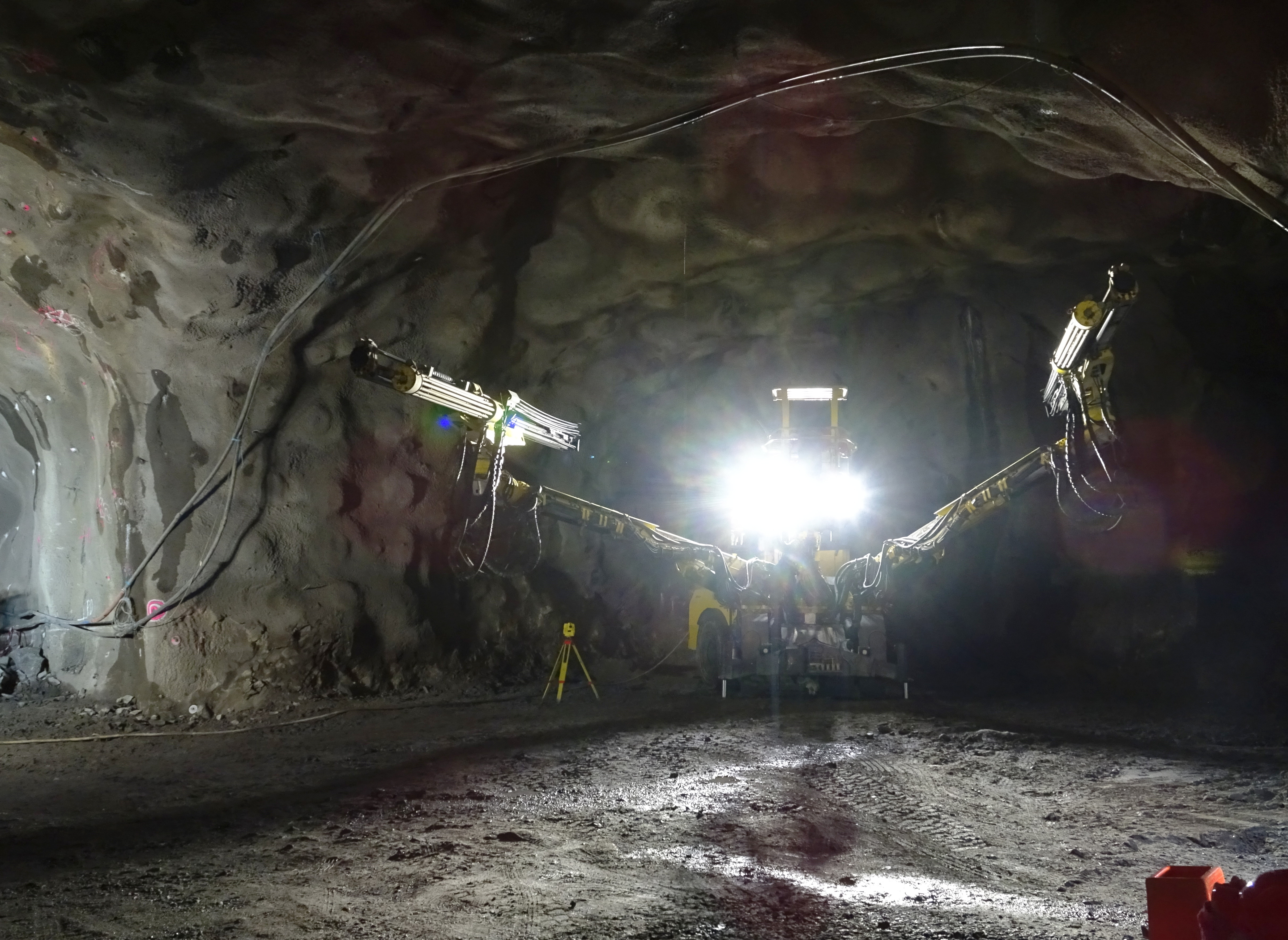 Förbifart, Skärholmen, tunnelvisning